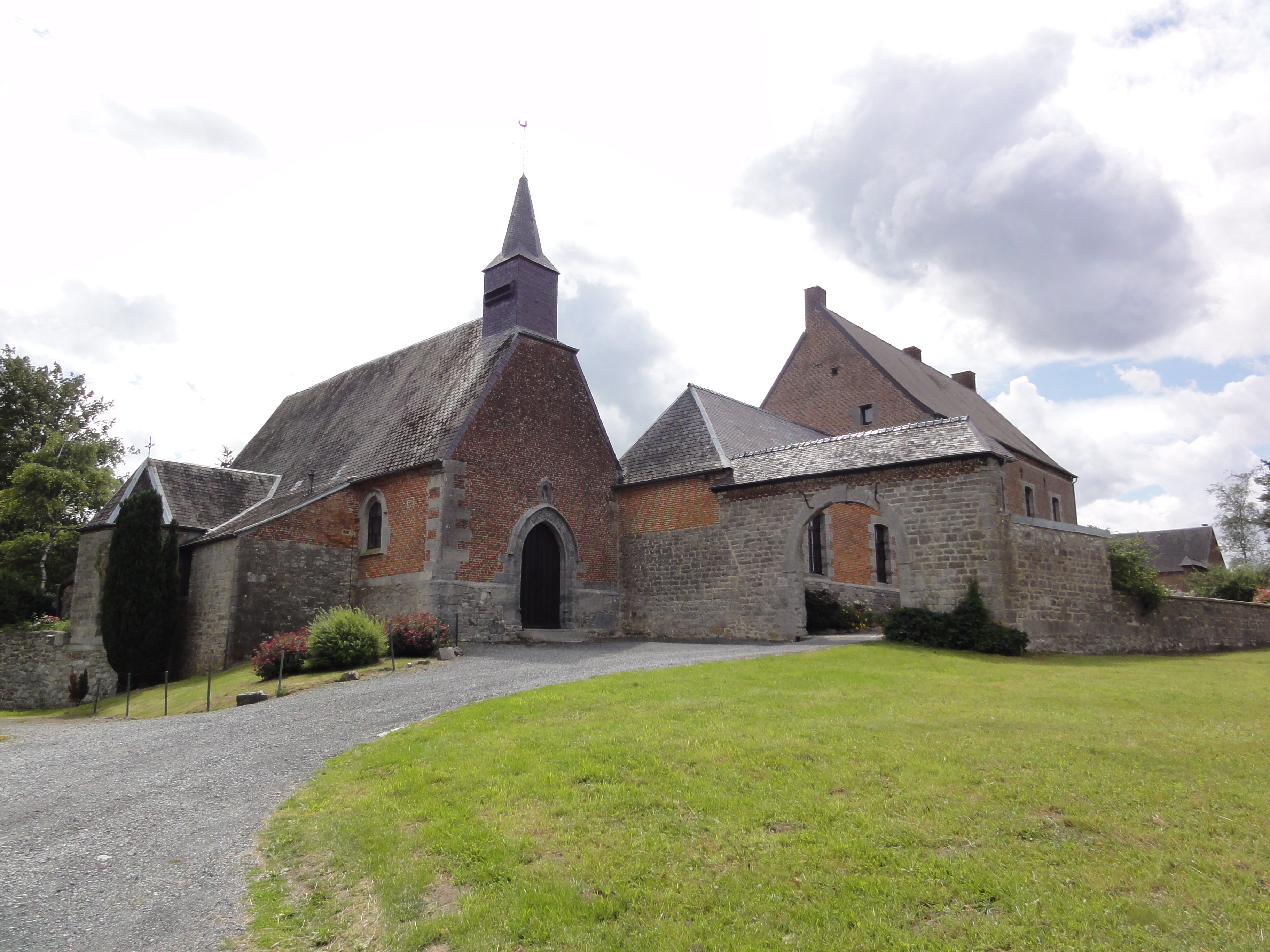 Moustier-en-Fagne (Nord, Fr) église et monastère